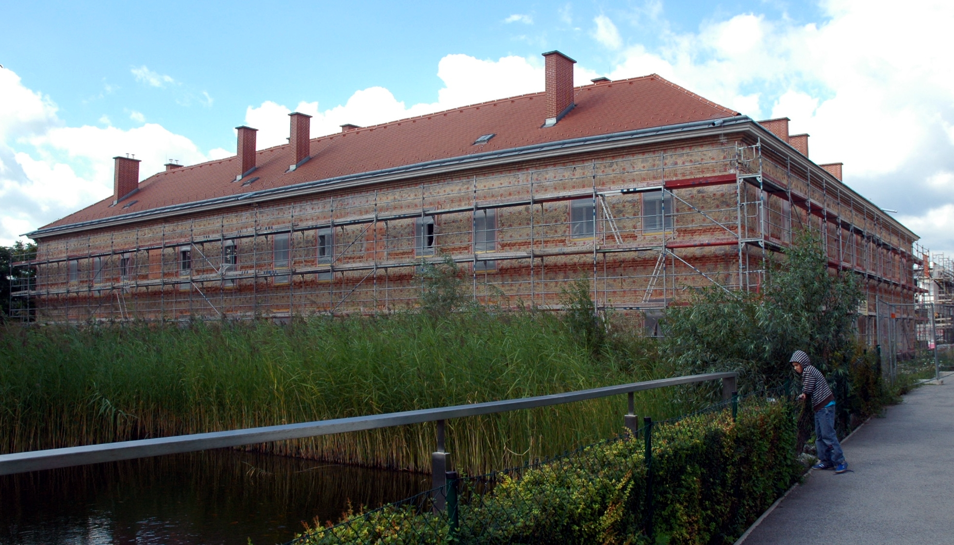 Aufnahme der k.k. Weiberstrafanstalt Wiener Neudorf, Osttrakt. Dieser wurde im Jahre 2010 generalrenoviert und ein betreutes Wohnen mit rd. 27 Wohneinehieten errichtet. Die Aufnahme zeigt noch den Ursprungszustand und sehr gut die Bausubstanz. Nun wird eine Plastikschaumisolierung, sogenanntes Polysirol (Wärmedämmung) für immer die alte Bausubstanz verdecken.